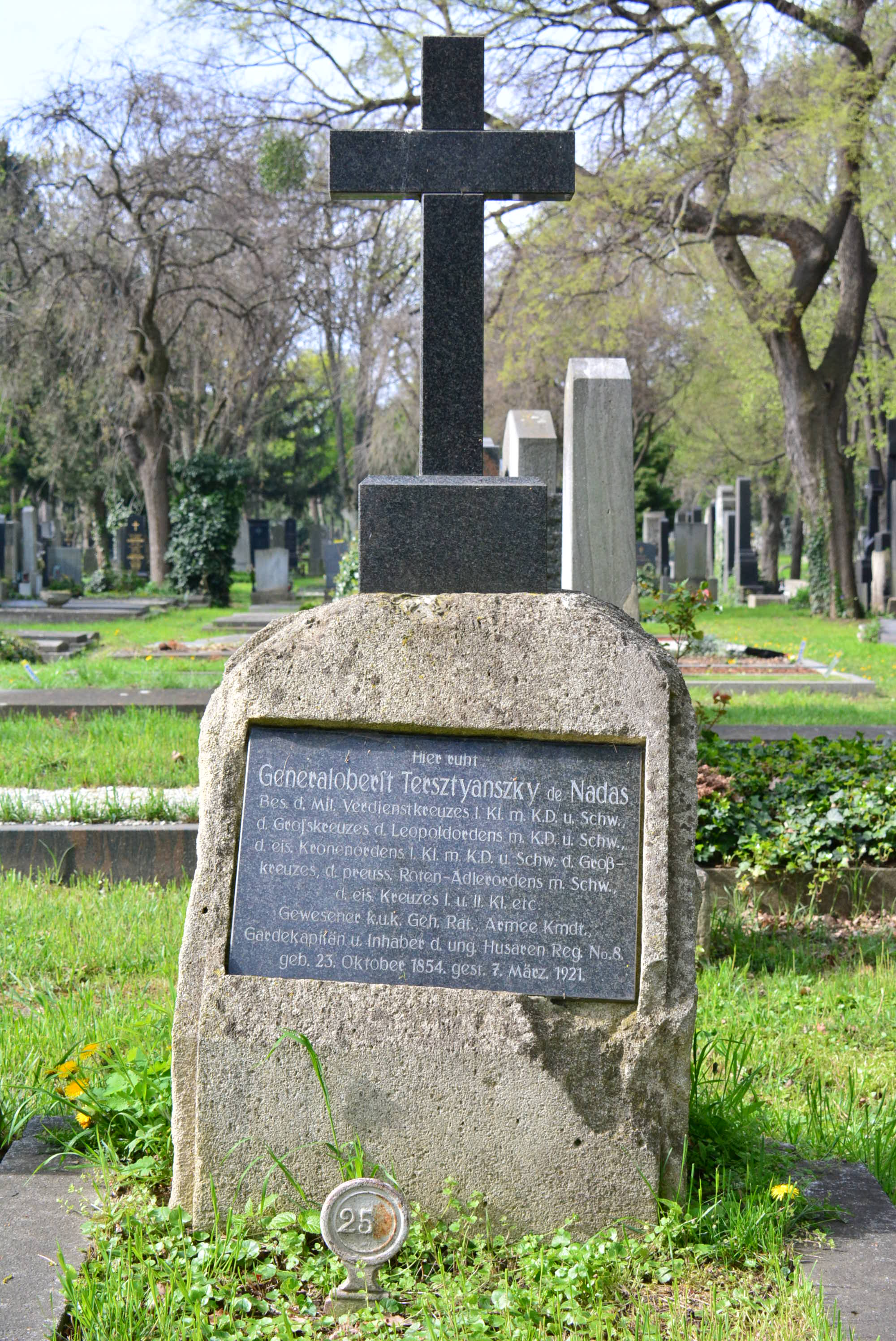 Grab von General Karl Tersztyánszky von Nádas (Gruppe 56 C, Reihe 2, Nr. 25)